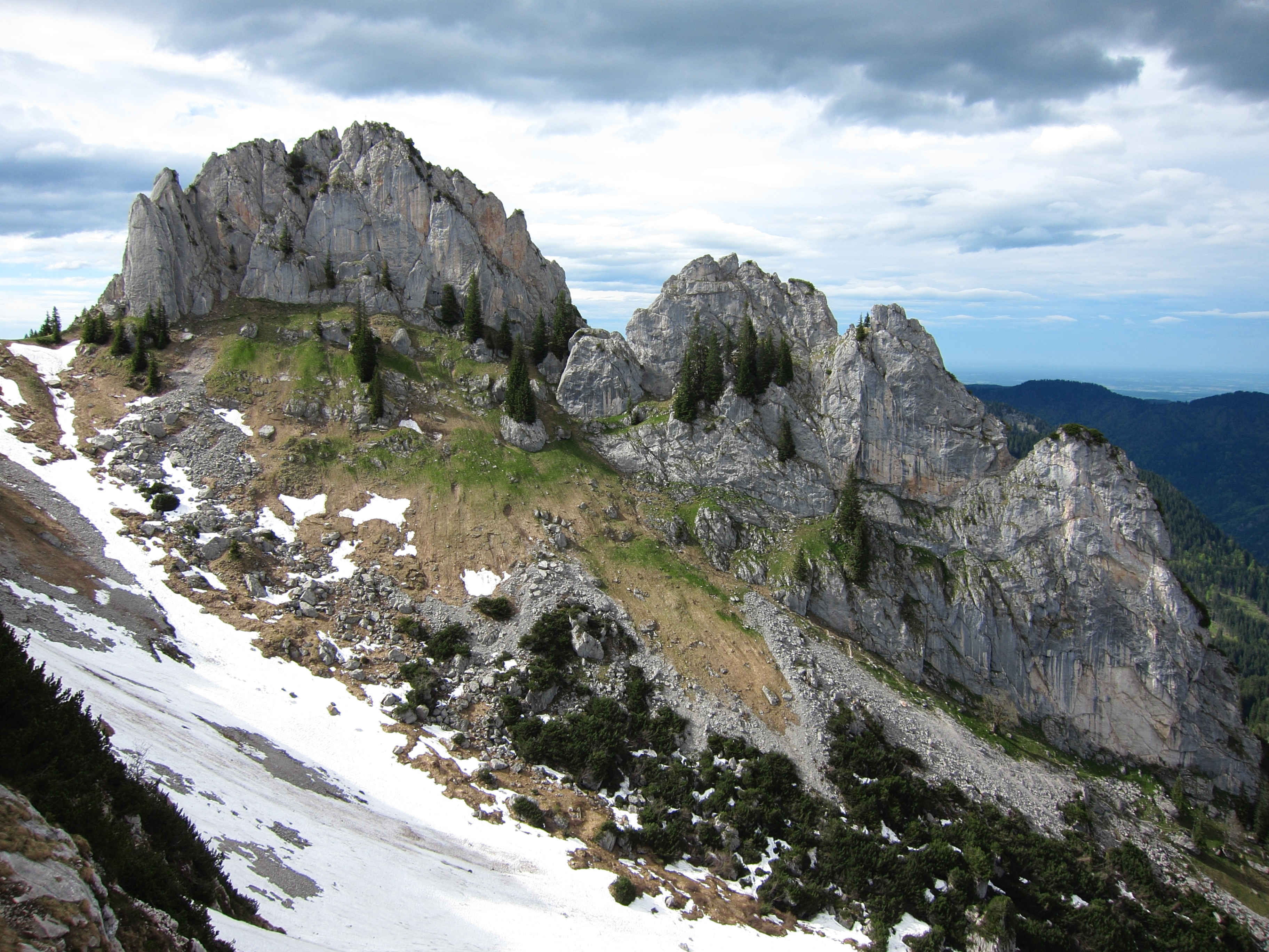 Plankenstein (1.768 m) vom Ostgrat des Risserkogel fotografiert